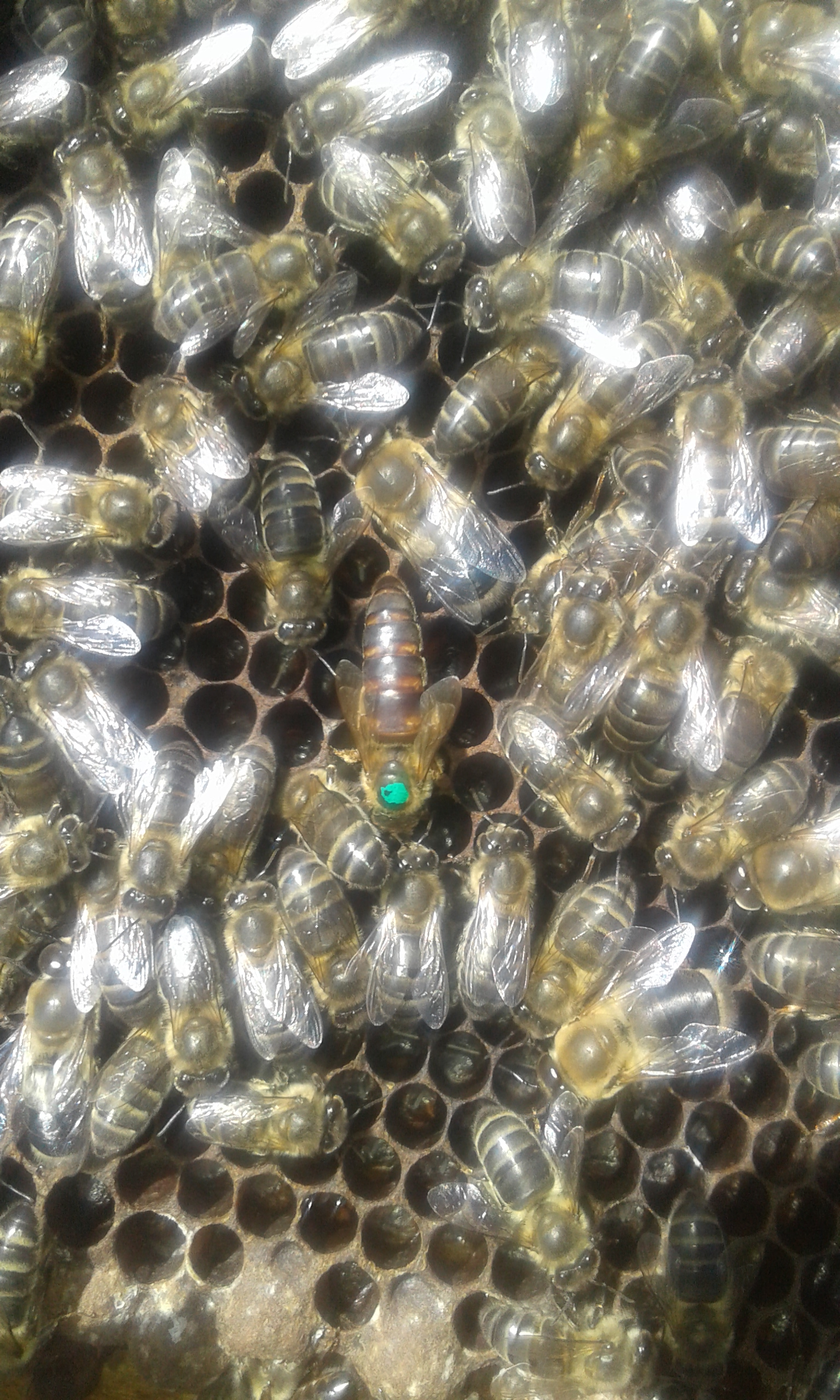 ملكة النحل التلي او ميليفيرا انترميسا